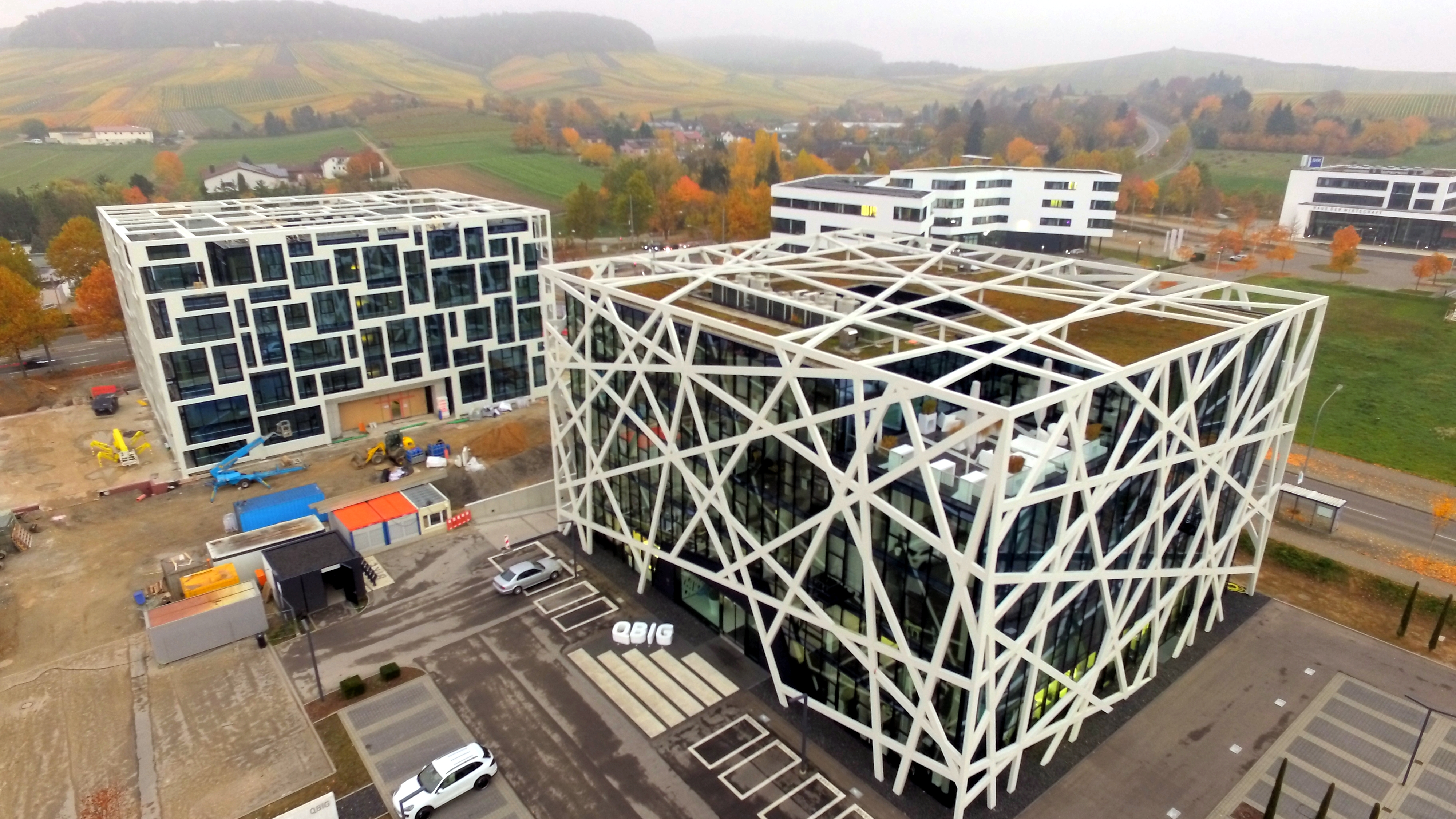 Bürogebäude QBig in Heilbronn: Außergewöhnliches Exo-Skelett